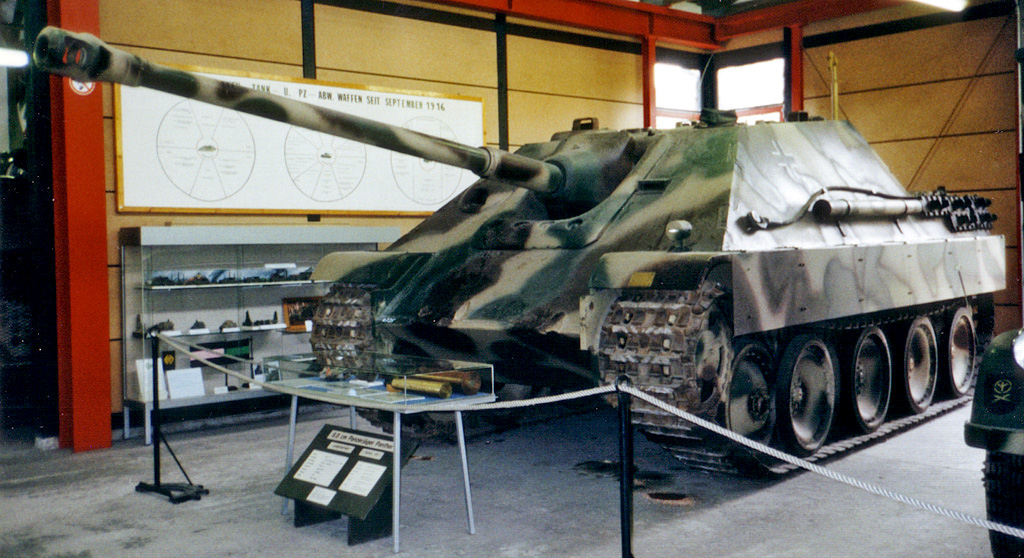 Beschreibung: Jagdpanzer V Jagdpanther (Sd.Kfz. 173), ausgestellt im Panzermuseum Munster